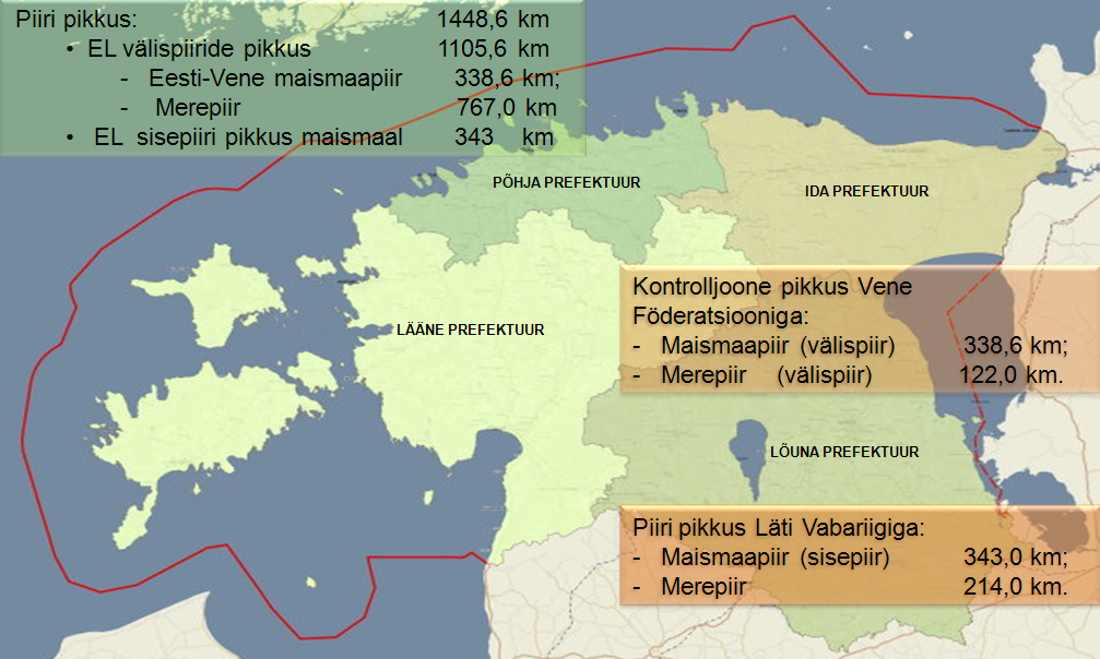 Eesti Vabariigi riigipiir ja Euroopa Liidu välispiir.